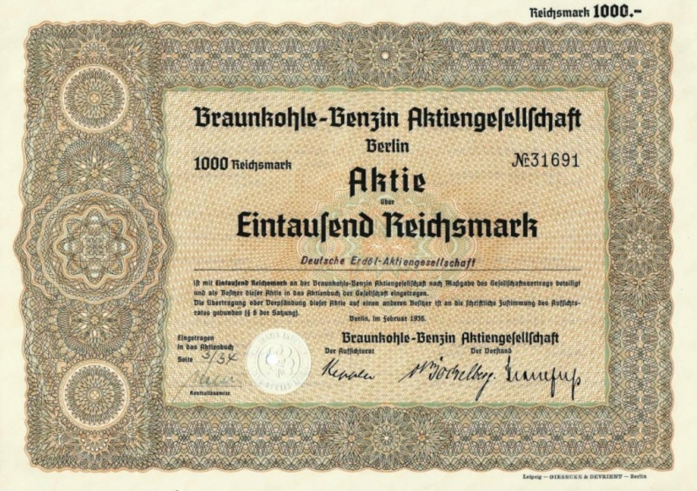 BRABAG-Aktie der Deutschen Erdöl AG